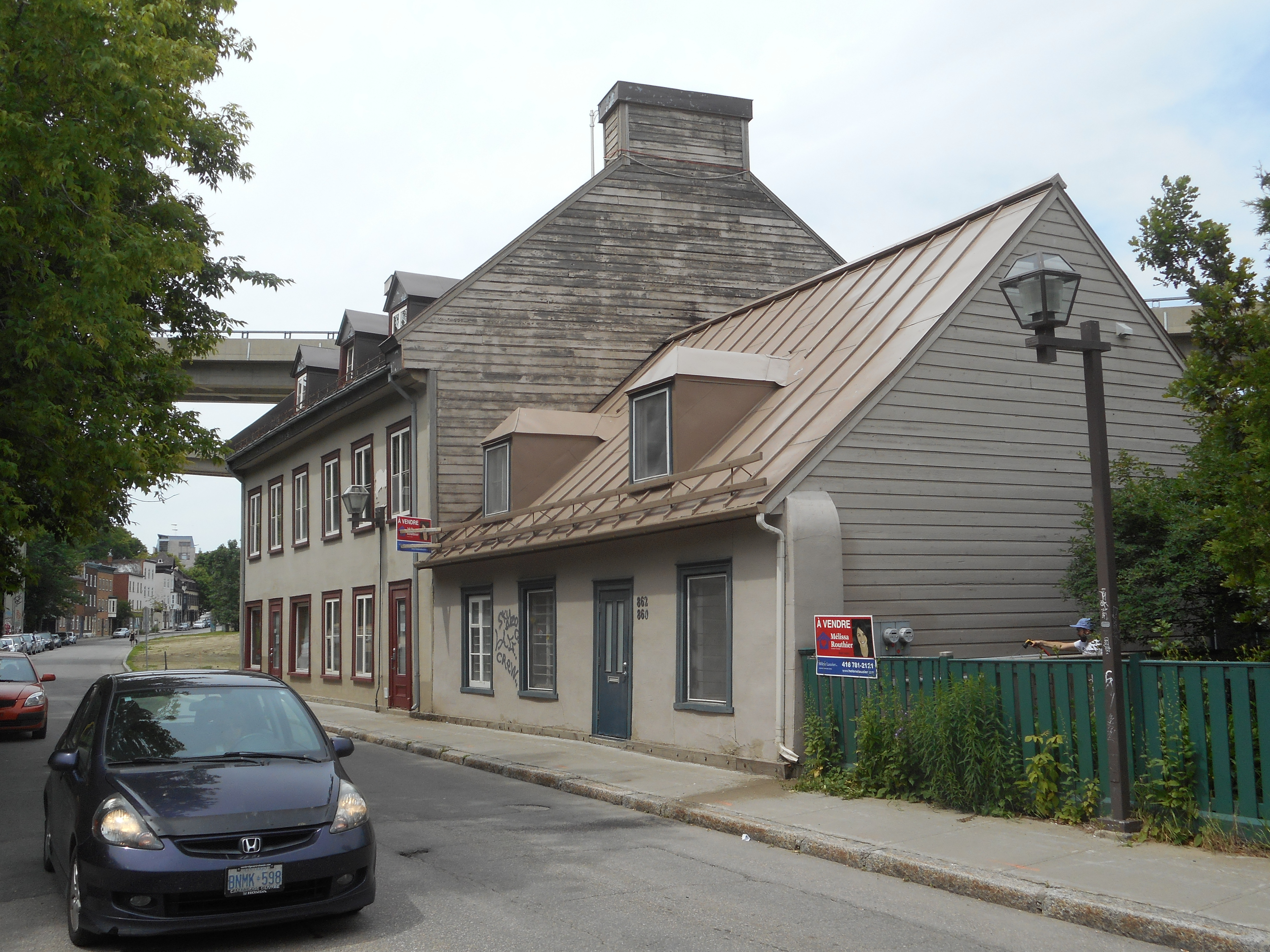 À gauche : 850-858, rue Saint-Vallier Est, Québec, construit en 1845 À droite : 860-862, rue Saint-Vallier